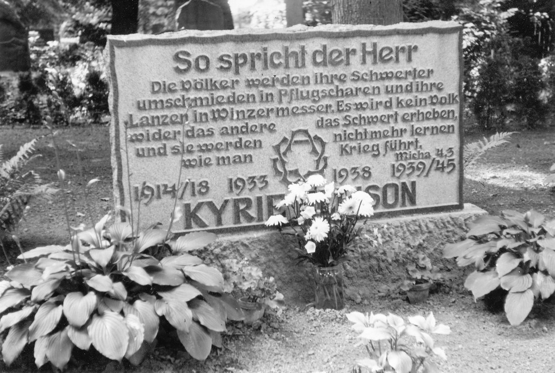 Gedenkstein auf Gramzower Friedhof